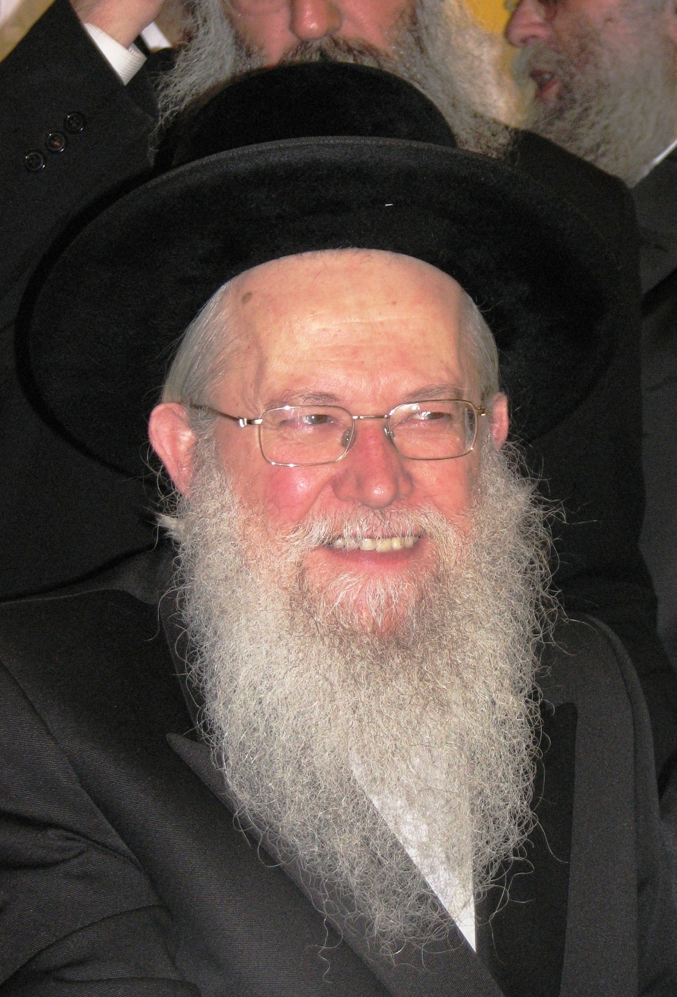 האדמו"ר מסלונים, הרב שמואל ברזובסקי רישיון נוצר על ידי משתמש:Yeshivatitri